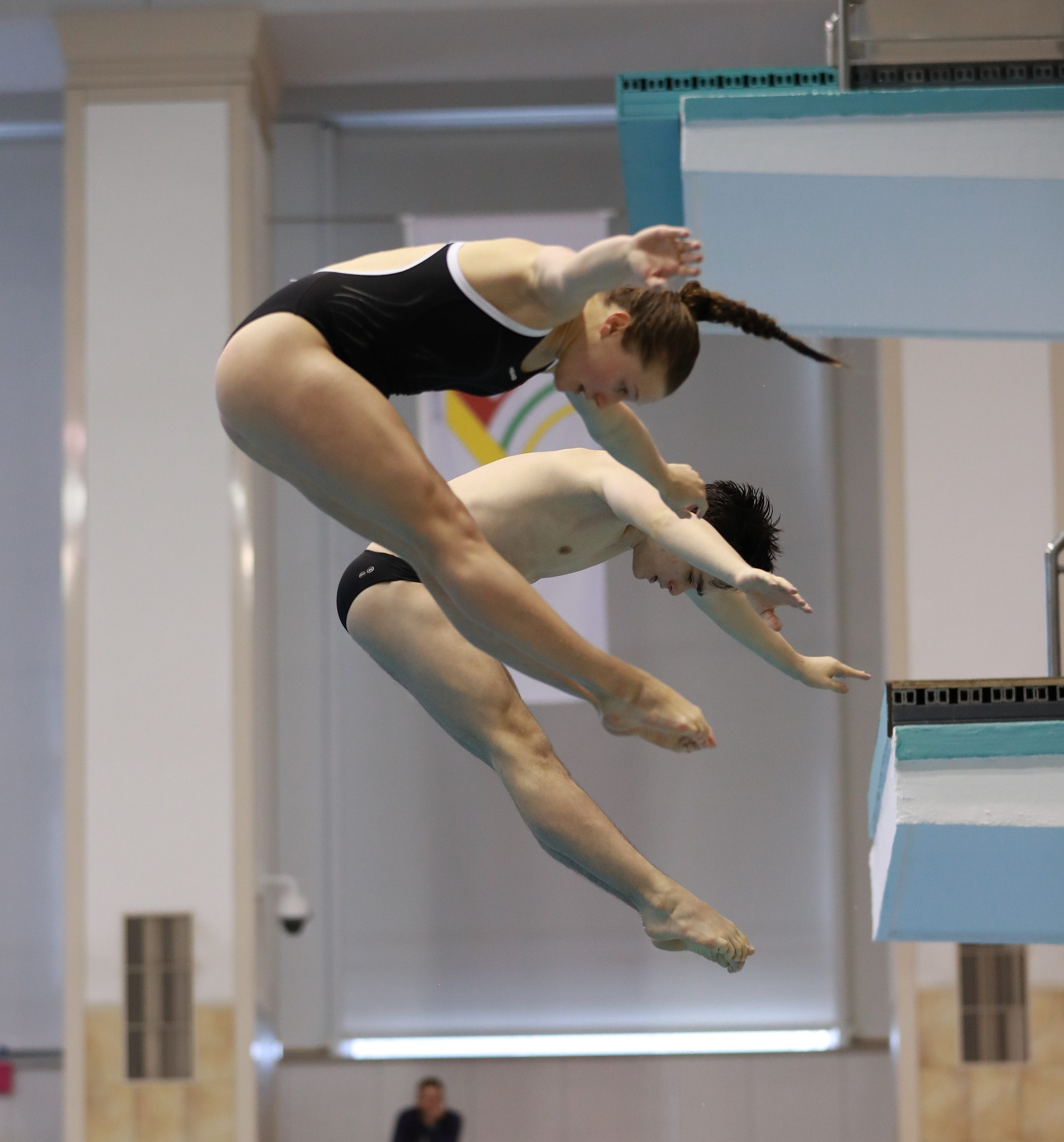 3m mixed Synchron Finale Sprung 1 bei den Internationalen Deutschen Hallenmeisterschaften im Wasserspringen Offene Klassen und Junioren. Abgebildet: Tina Punzel. Lou Massenberg.